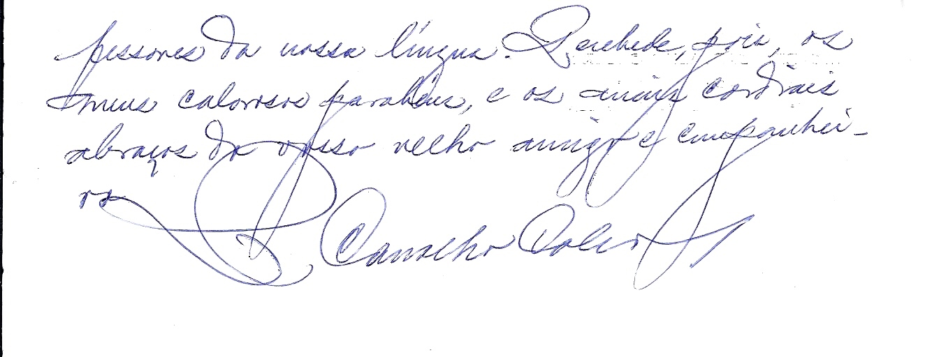 Autógrafo de Ricardo Carballo Calero